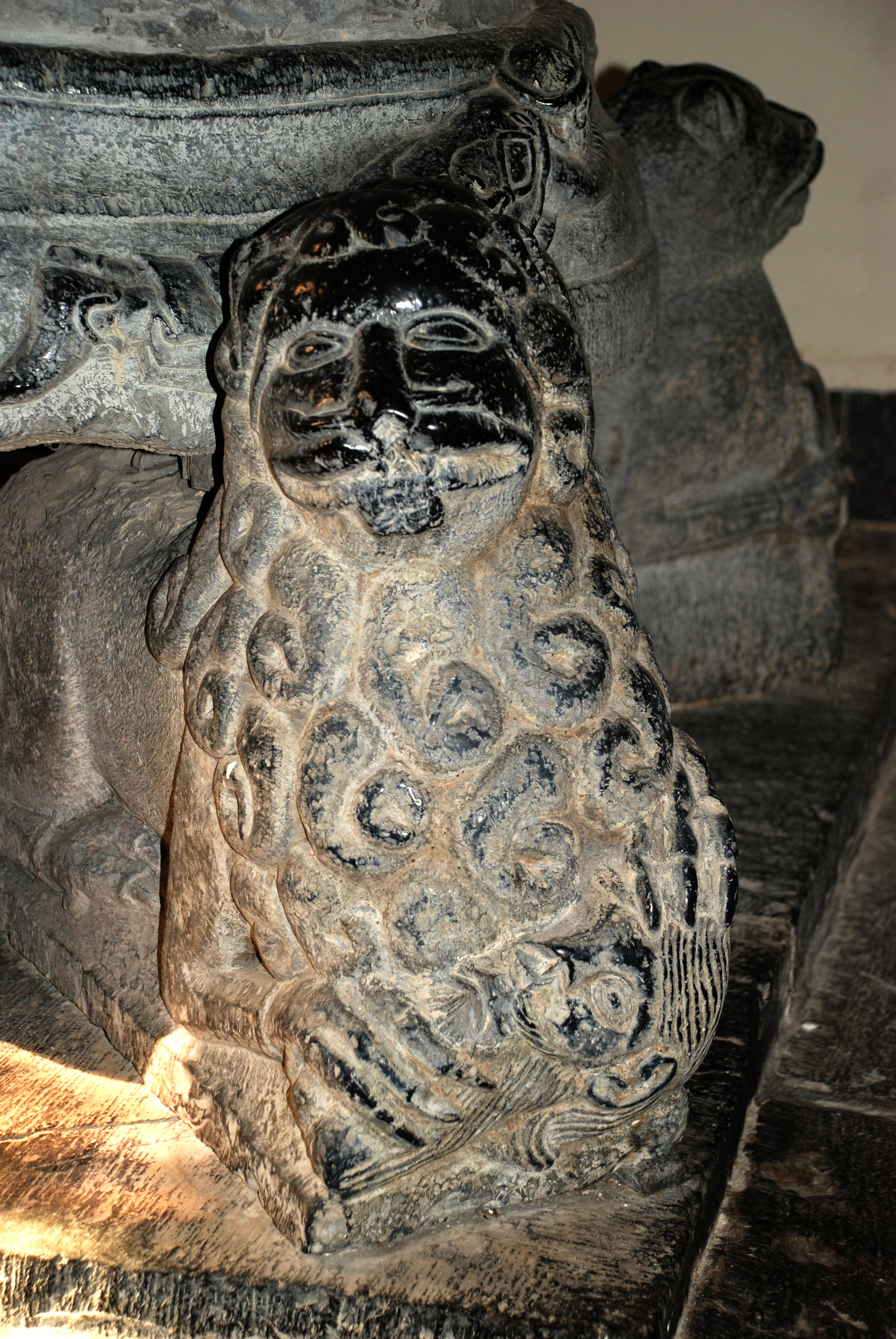 Belgique - Province de Namur - Fonts baptismaux de Furnaux - Lion androphage